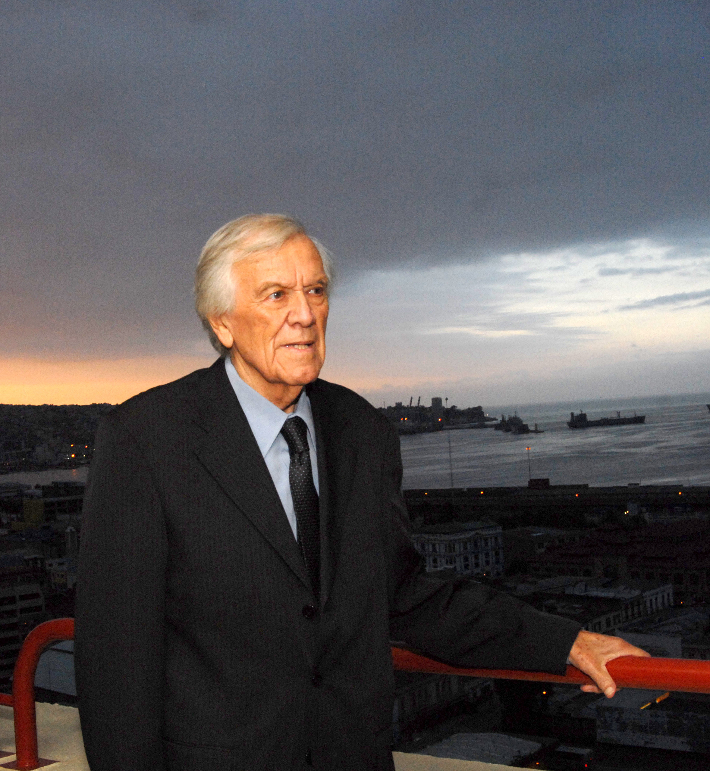 Cóctel Cámara de Diputados